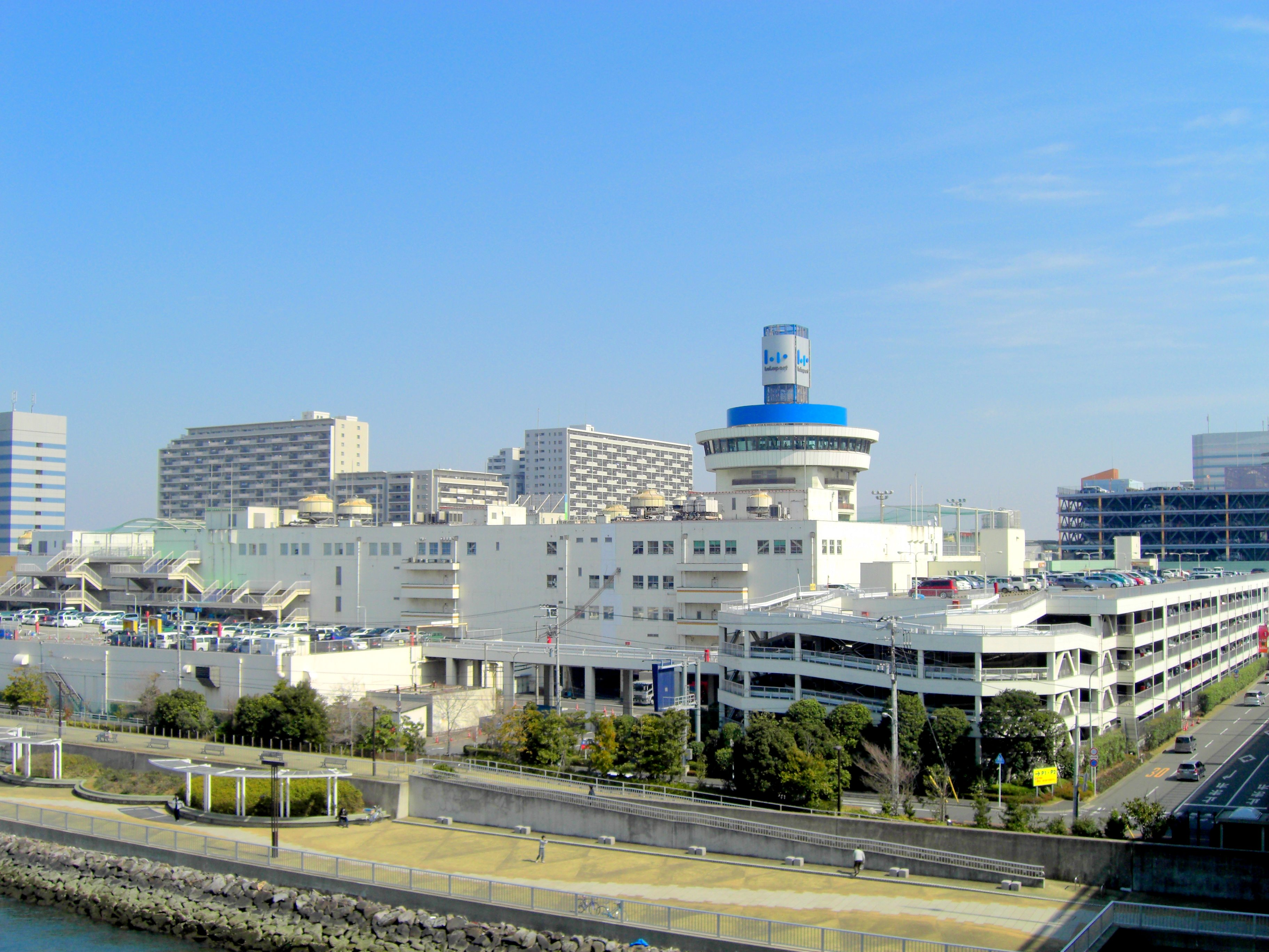 LaLaport TOKYO-BAY